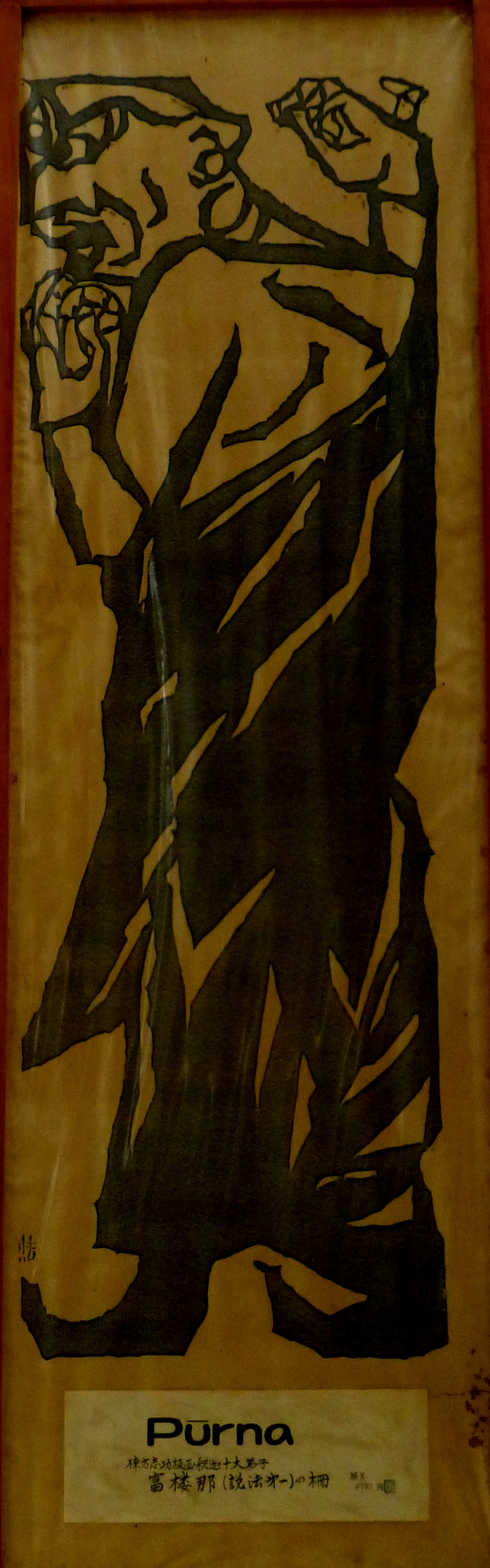 059 Purna at Rajgir Photograph from Rajgir in Bihar taken by Anandajoti.